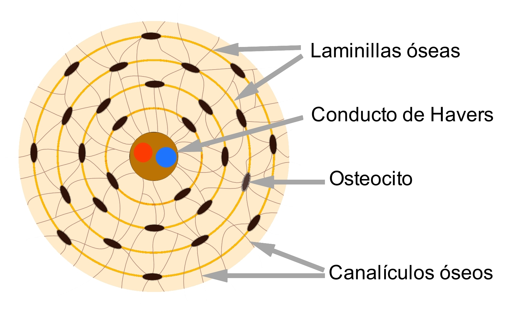 Esquema en el que se muestra la estructura de una osteona perteneciente al tejido óseo compacto